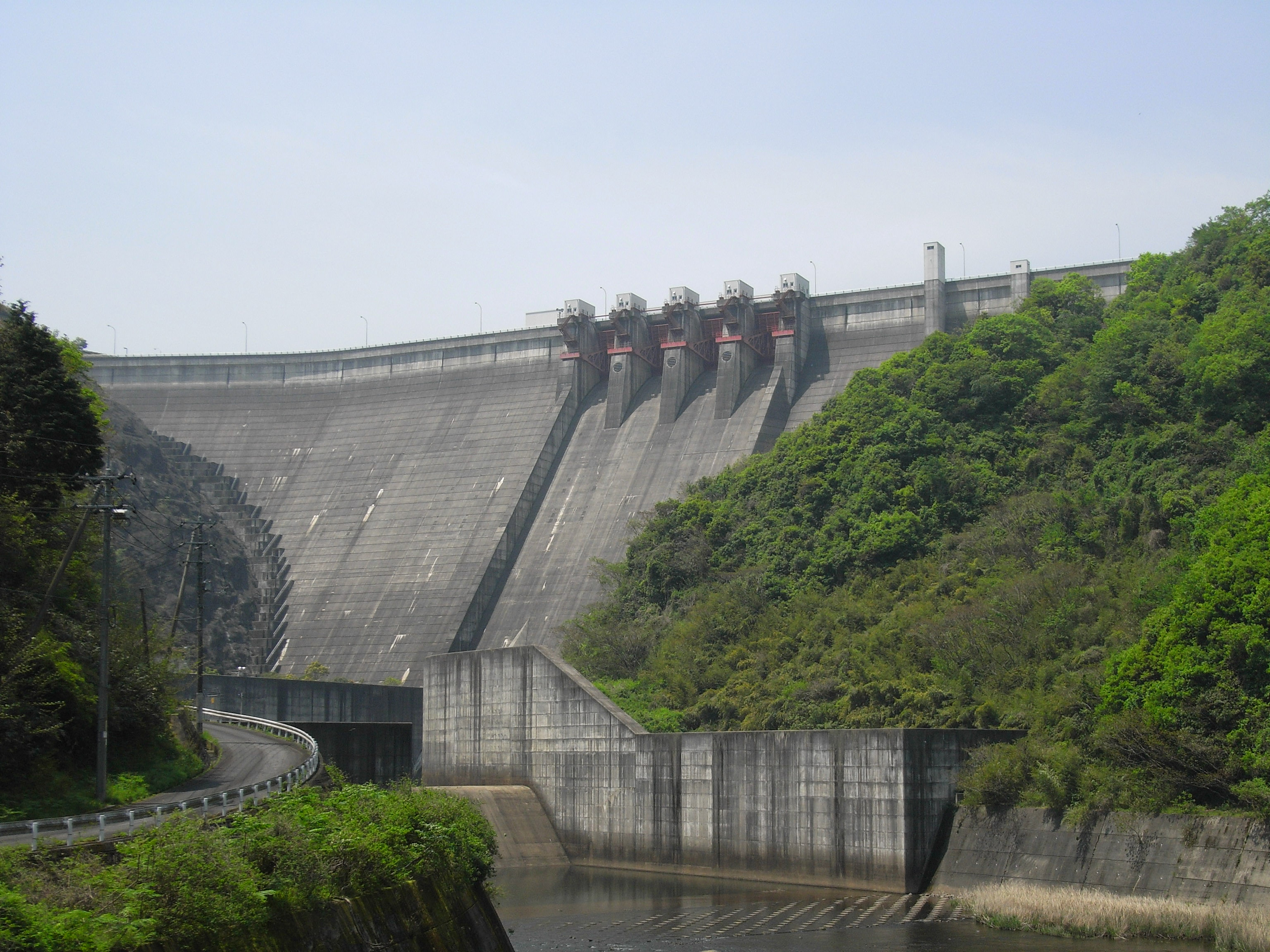 Dam